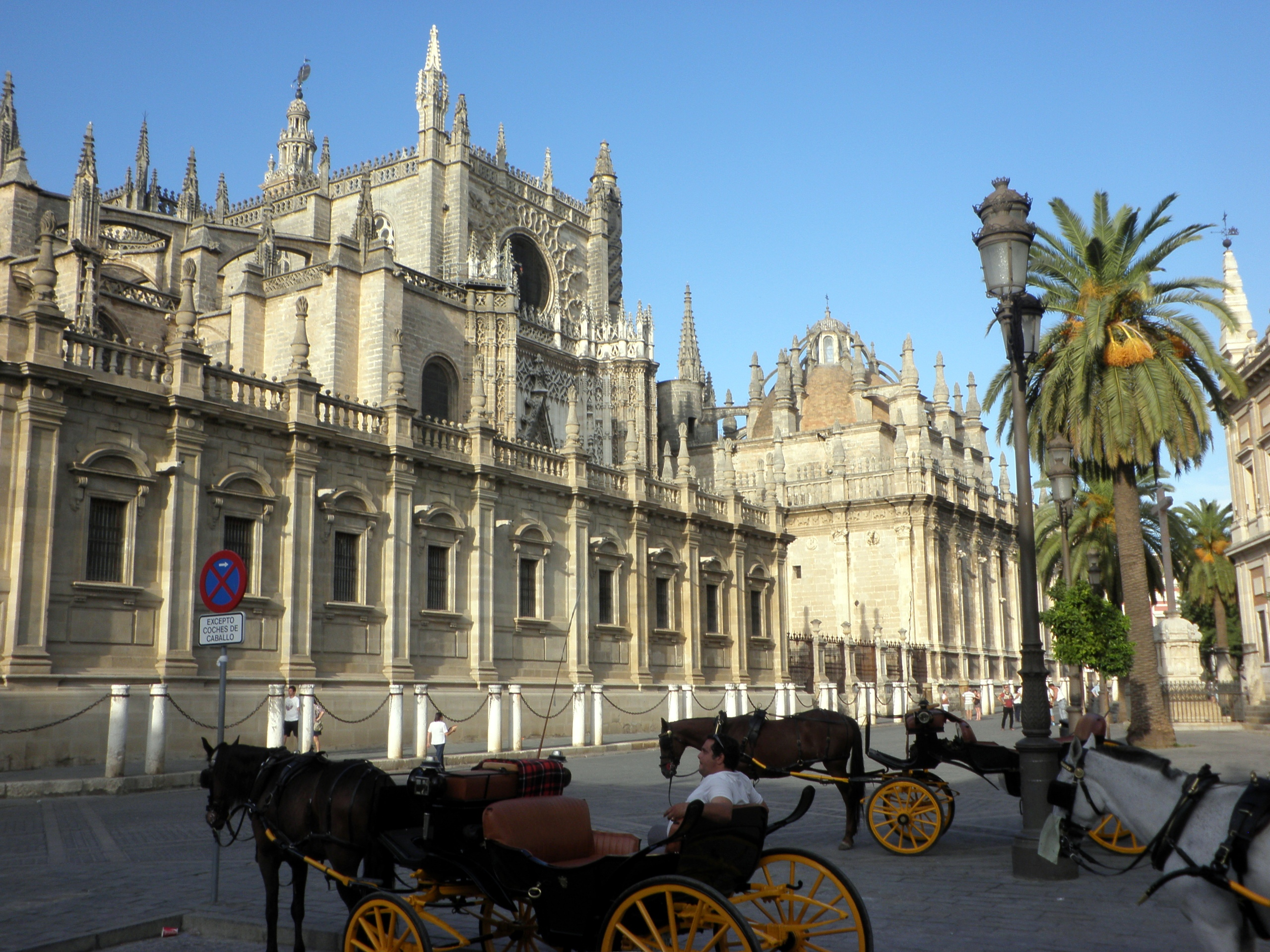 Catedral de Santa María, Sevilla, España.